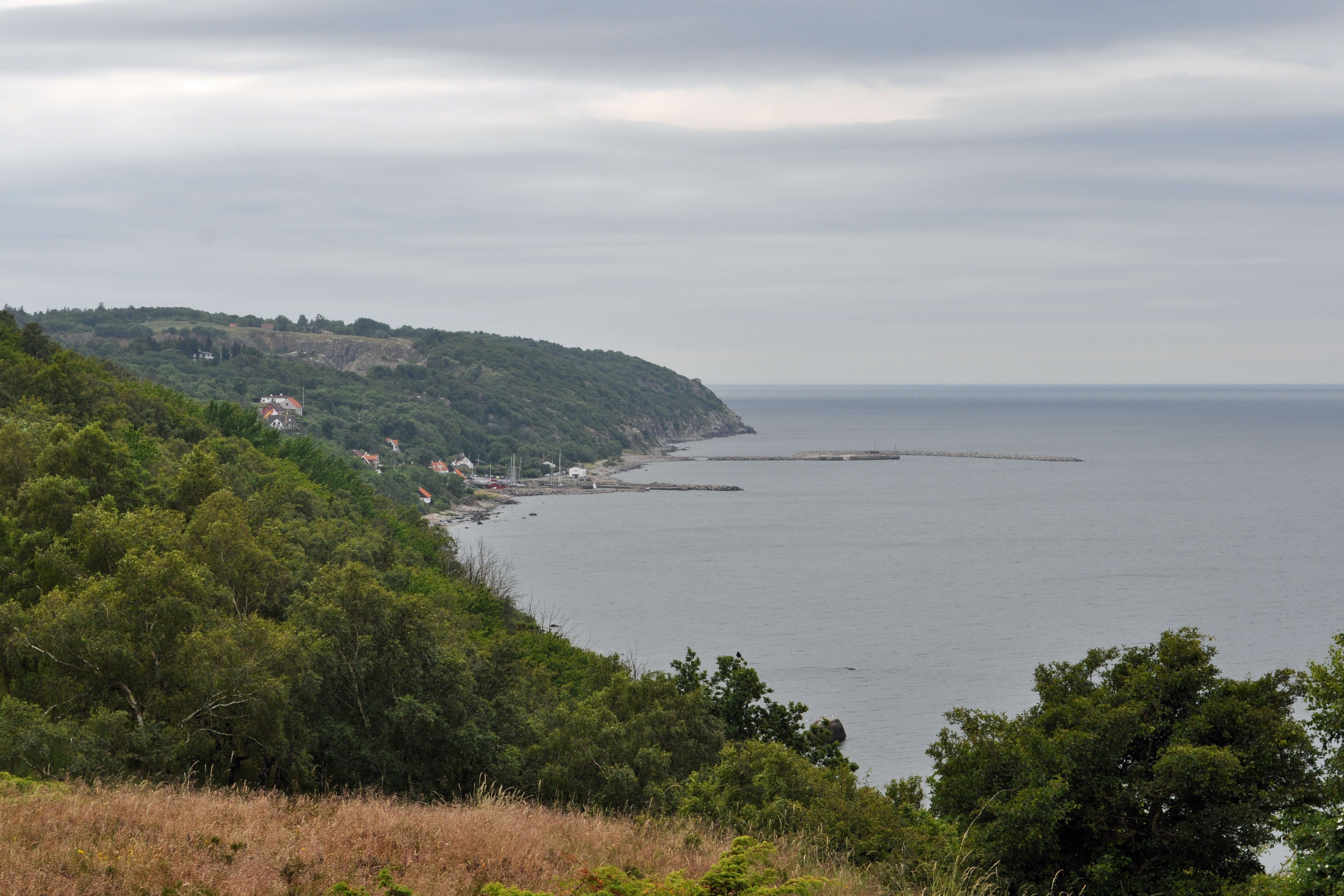 Slotslyngen, Bornholm (2012-07-04), by Klugschnacker in Wikipedia (2)